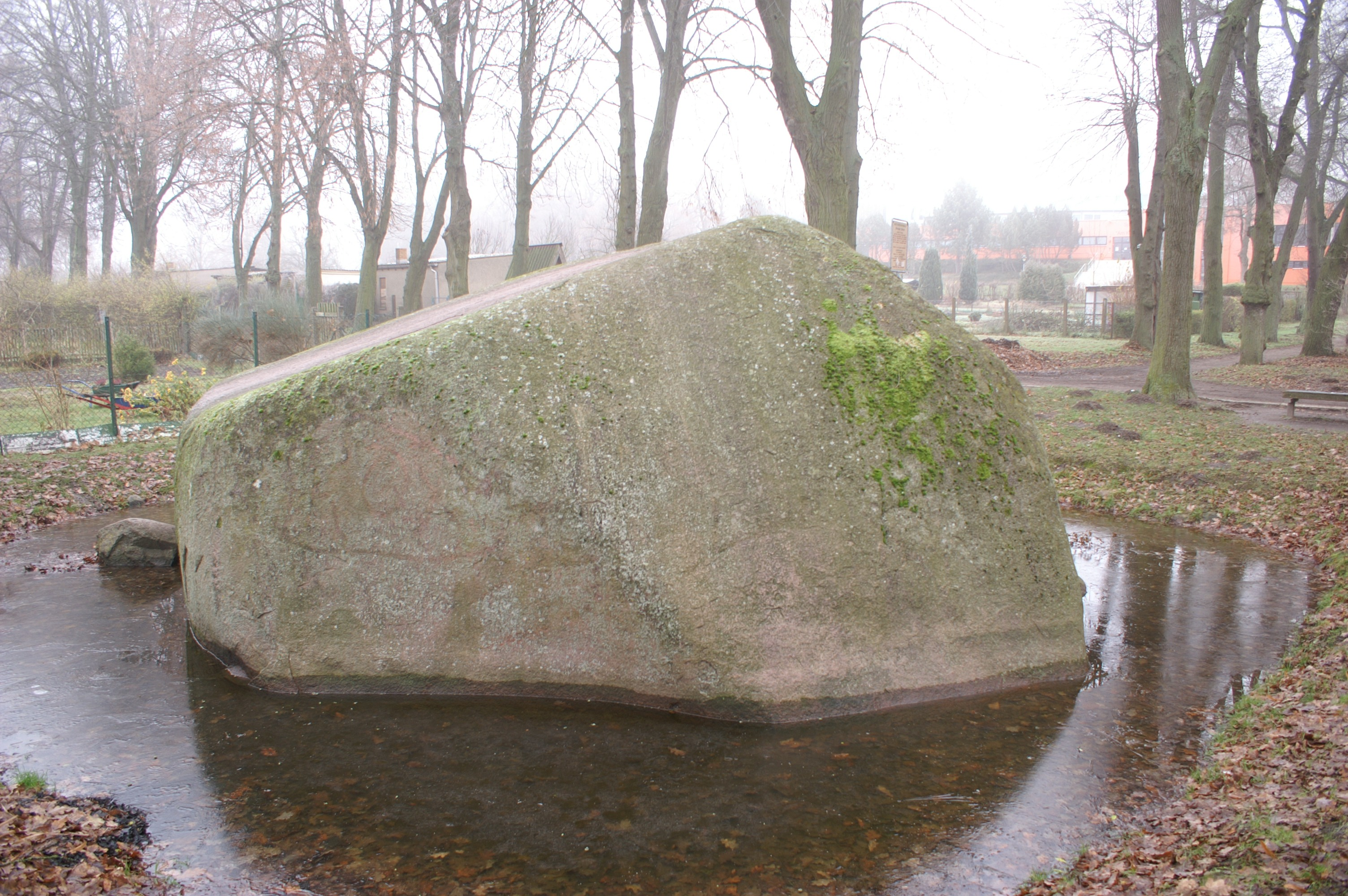 Großer Stein bei Altentreptow, Mecklenburg-Vorpommern